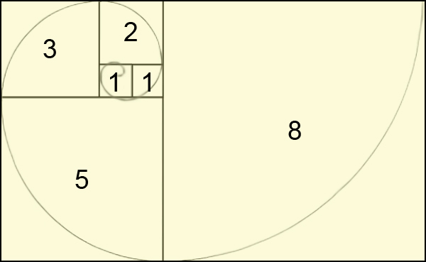 Descrizione: Sezione Aurea Fibonacci Autore: Bartolini Valerio